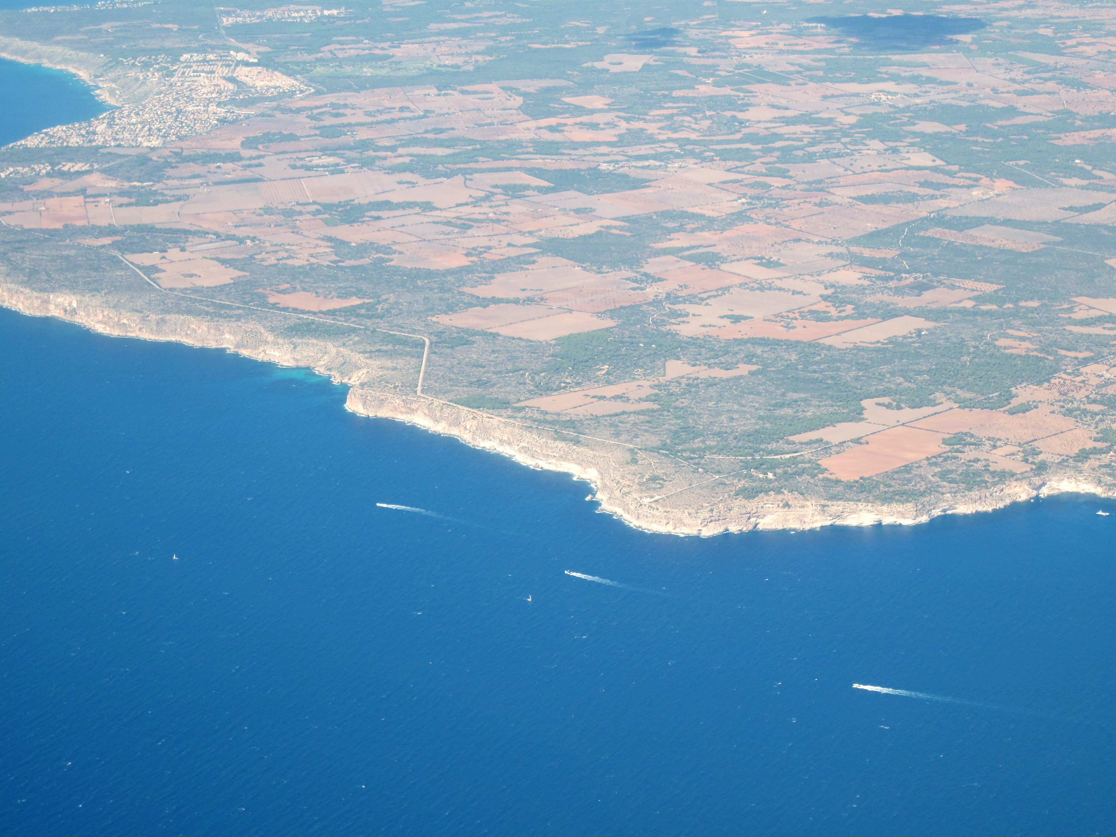 Luftbild von Cap Blanc an der Küste der Gemeinde Llucmajor, Mallorca, Spanien